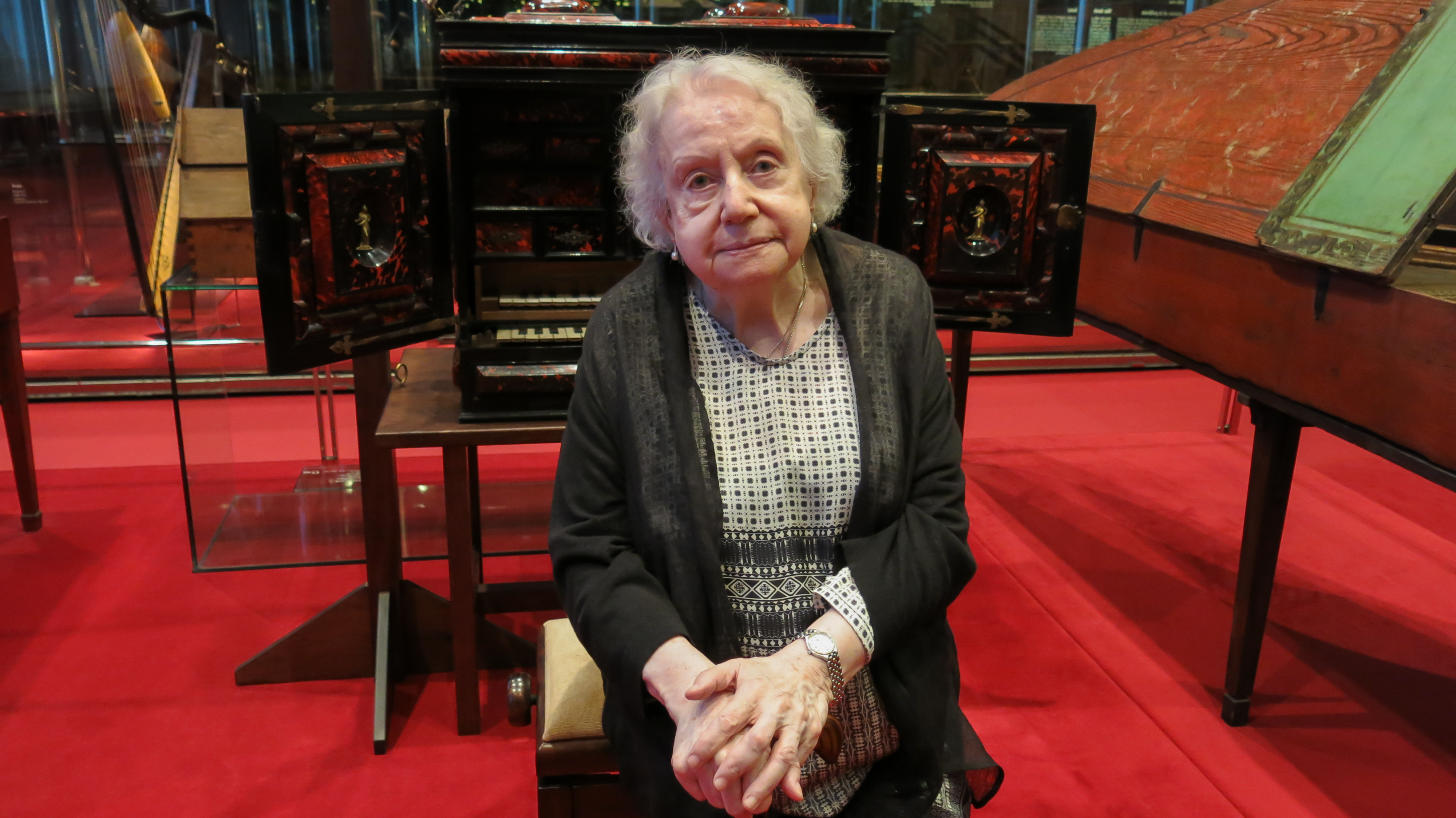 Montserrat Torrent, organista i pedagoga